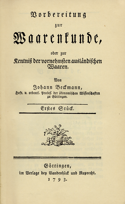 Johann Beckmann: Vorbereitung zur Waarenkunde, title page